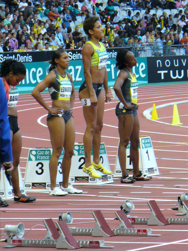 Meeting Gaz de France (Golden League) - Stade de France 2007 Line up with Barber, Edwards, Arron